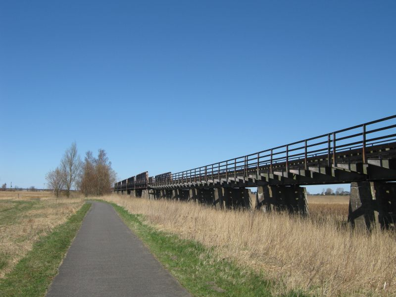 Brücke der Darßbahn am Bodstedter Bodden, parallel verläuft der Ostseeküsten-Radweg.